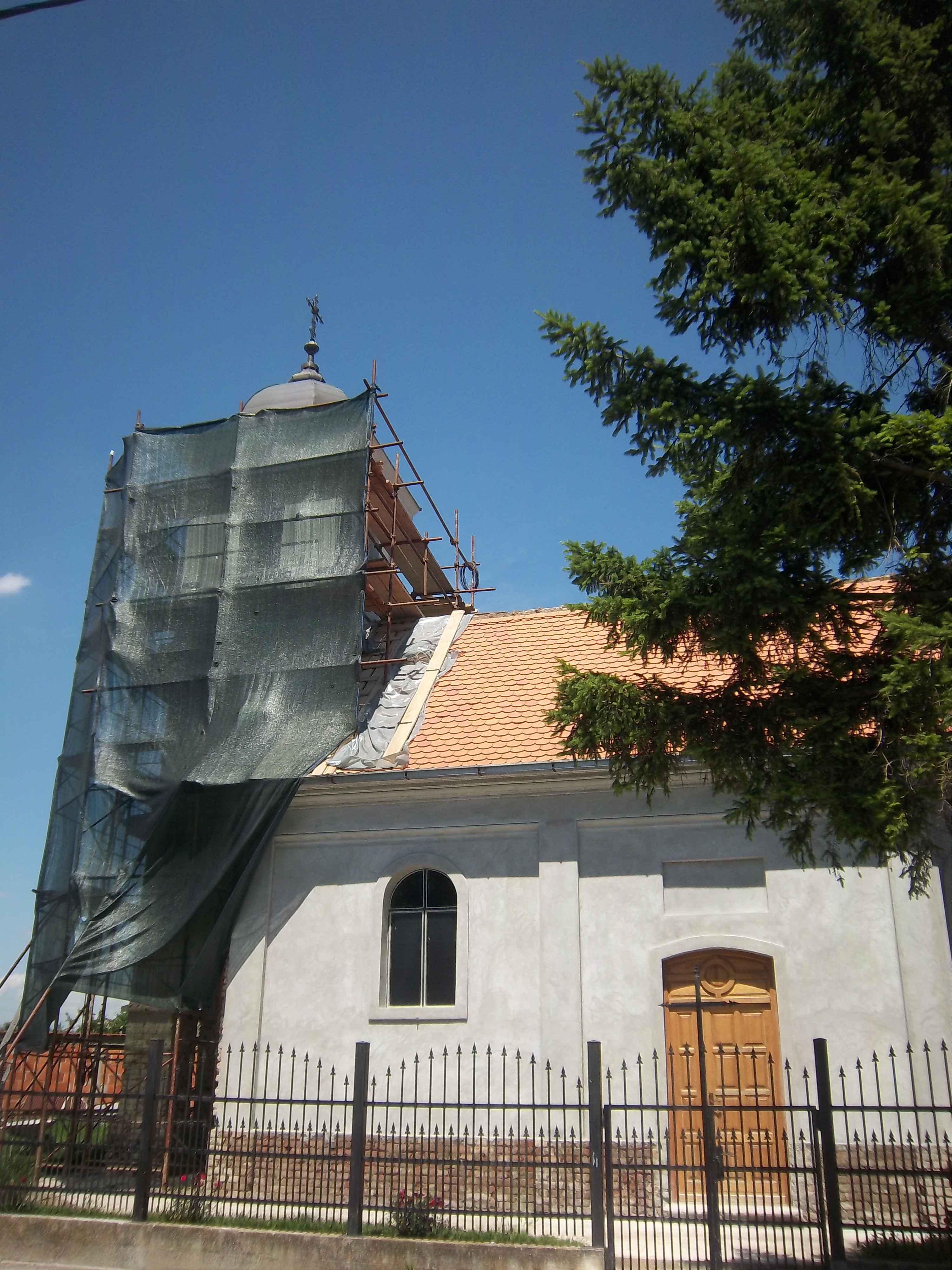 Srpskohrvatski / српскохрватски: Pravoslavna crkva u Novim Jankovcima, Republika Hrvatska